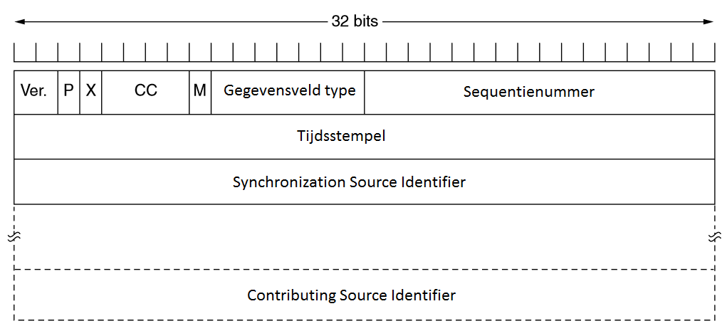 RTP Header